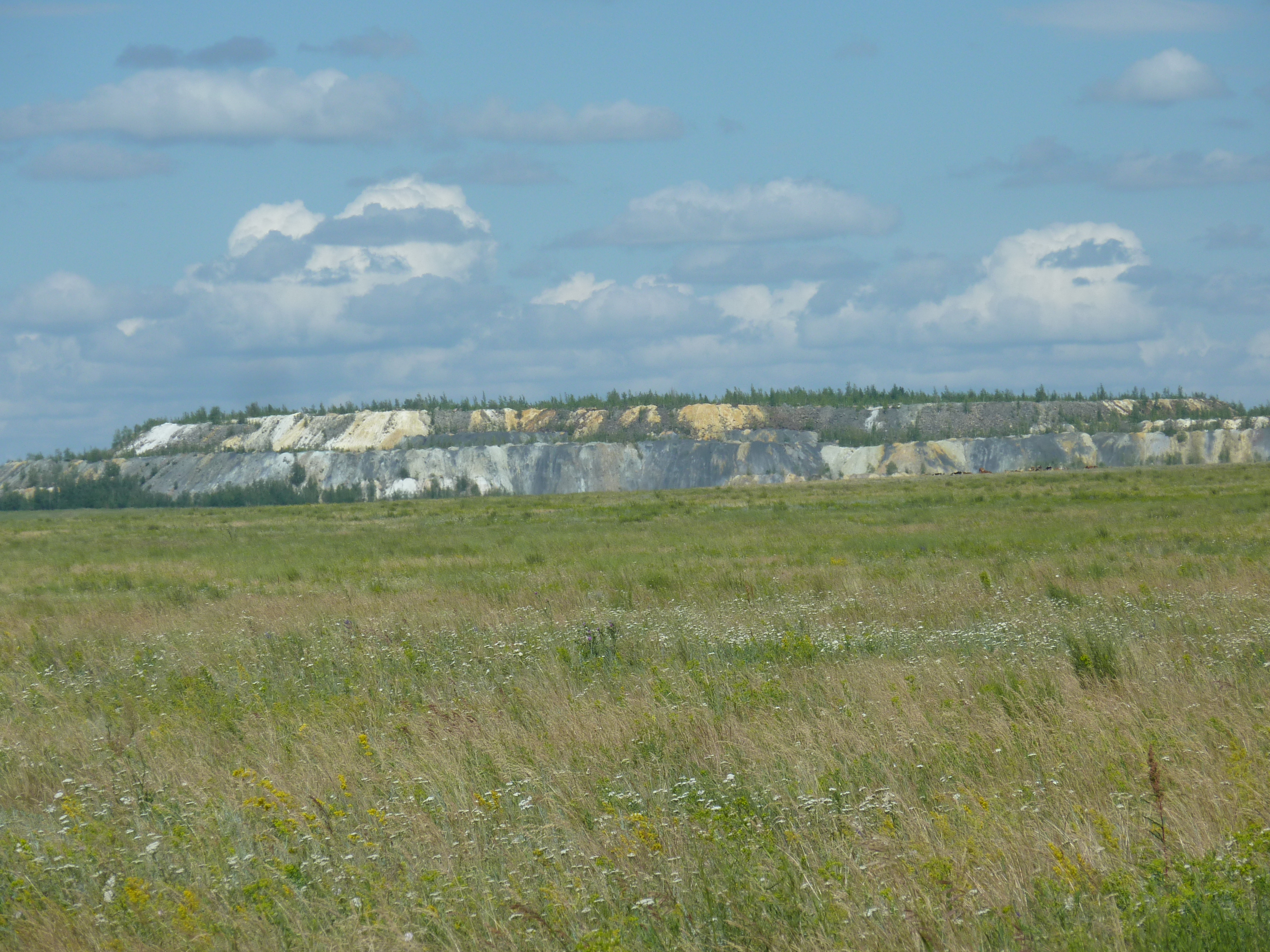 Отвалы хрустального карьера